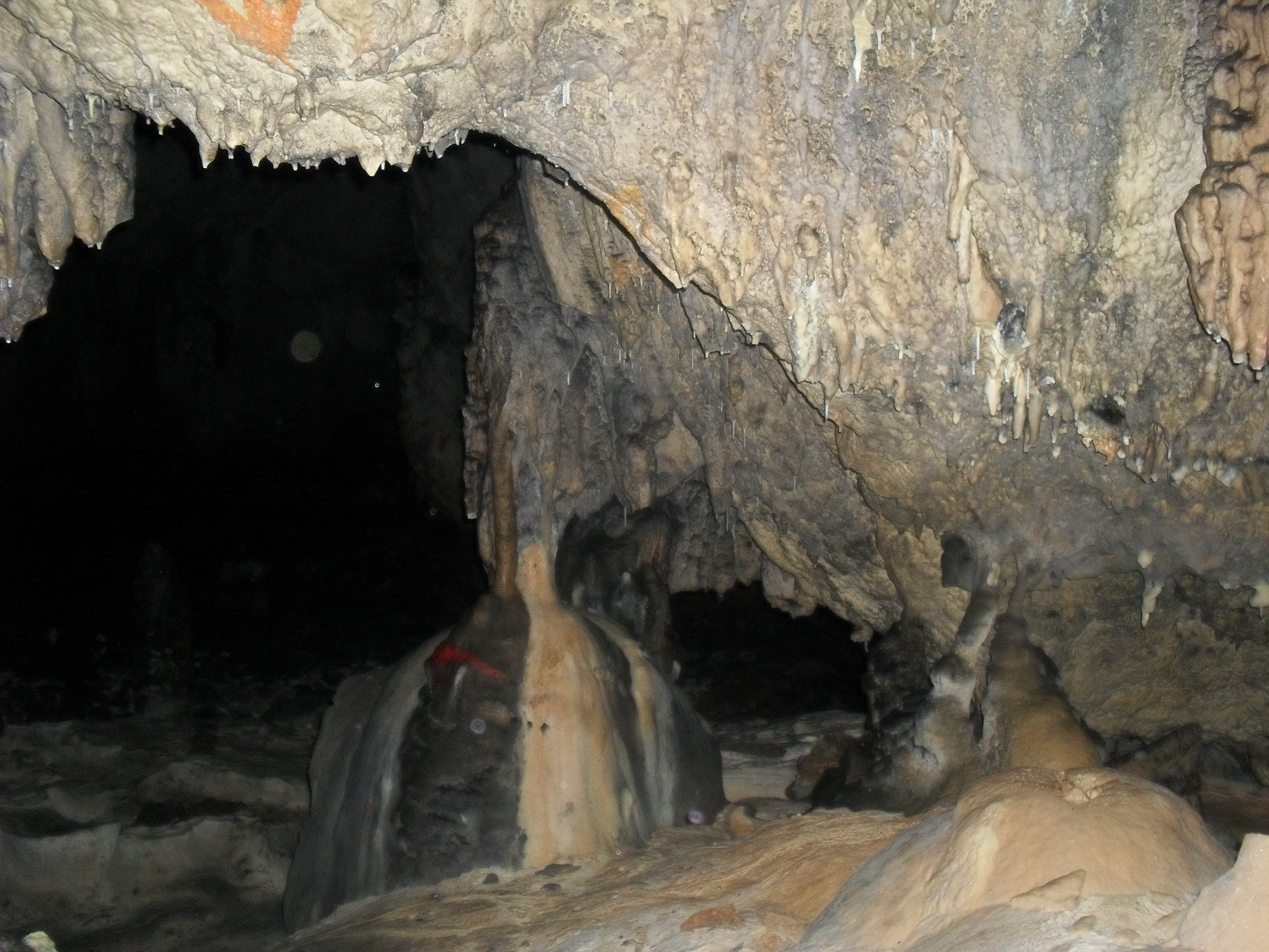 Бања Стијена детаљ из пећине.